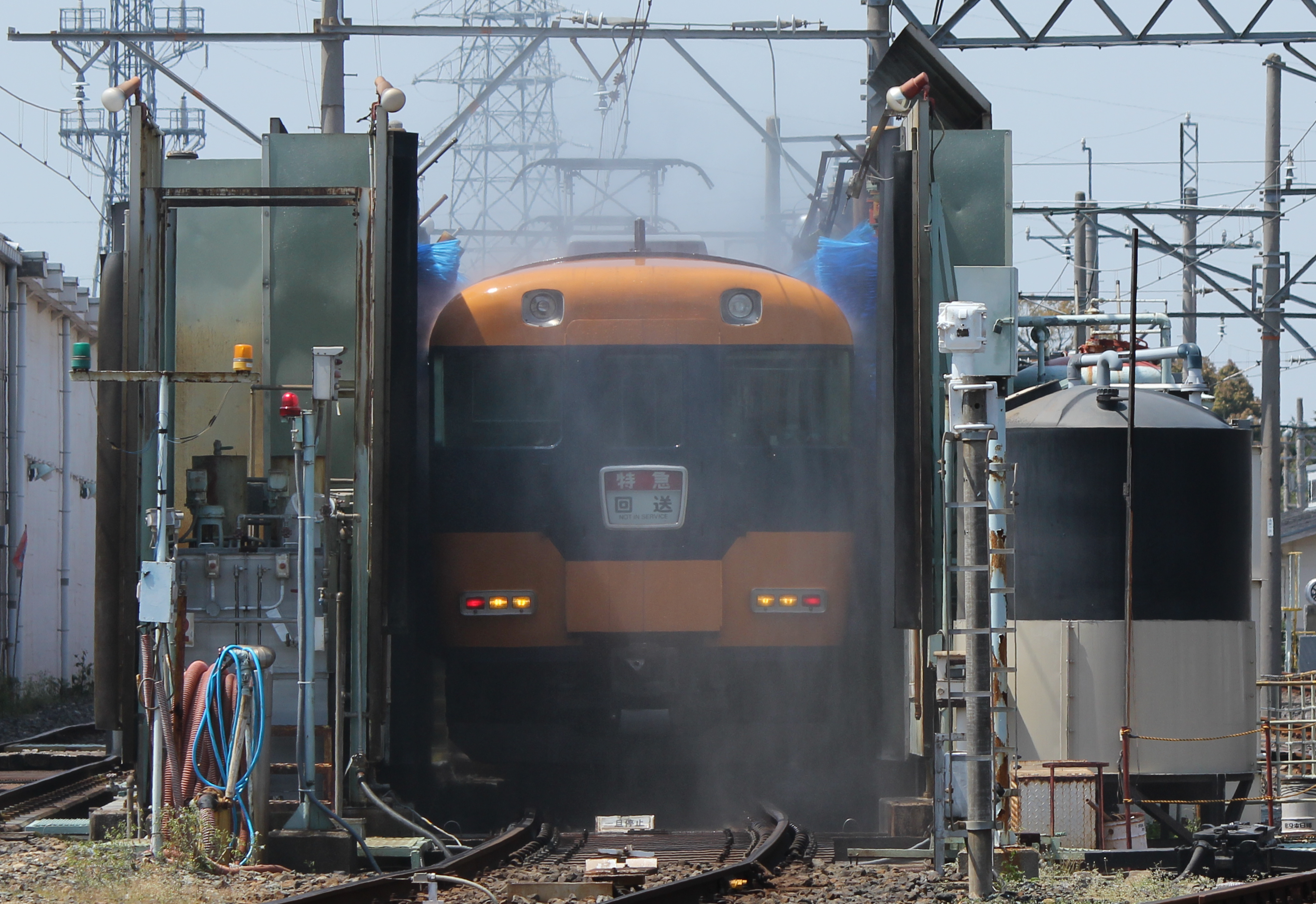 明星車庫における洗車（近鉄12200系）